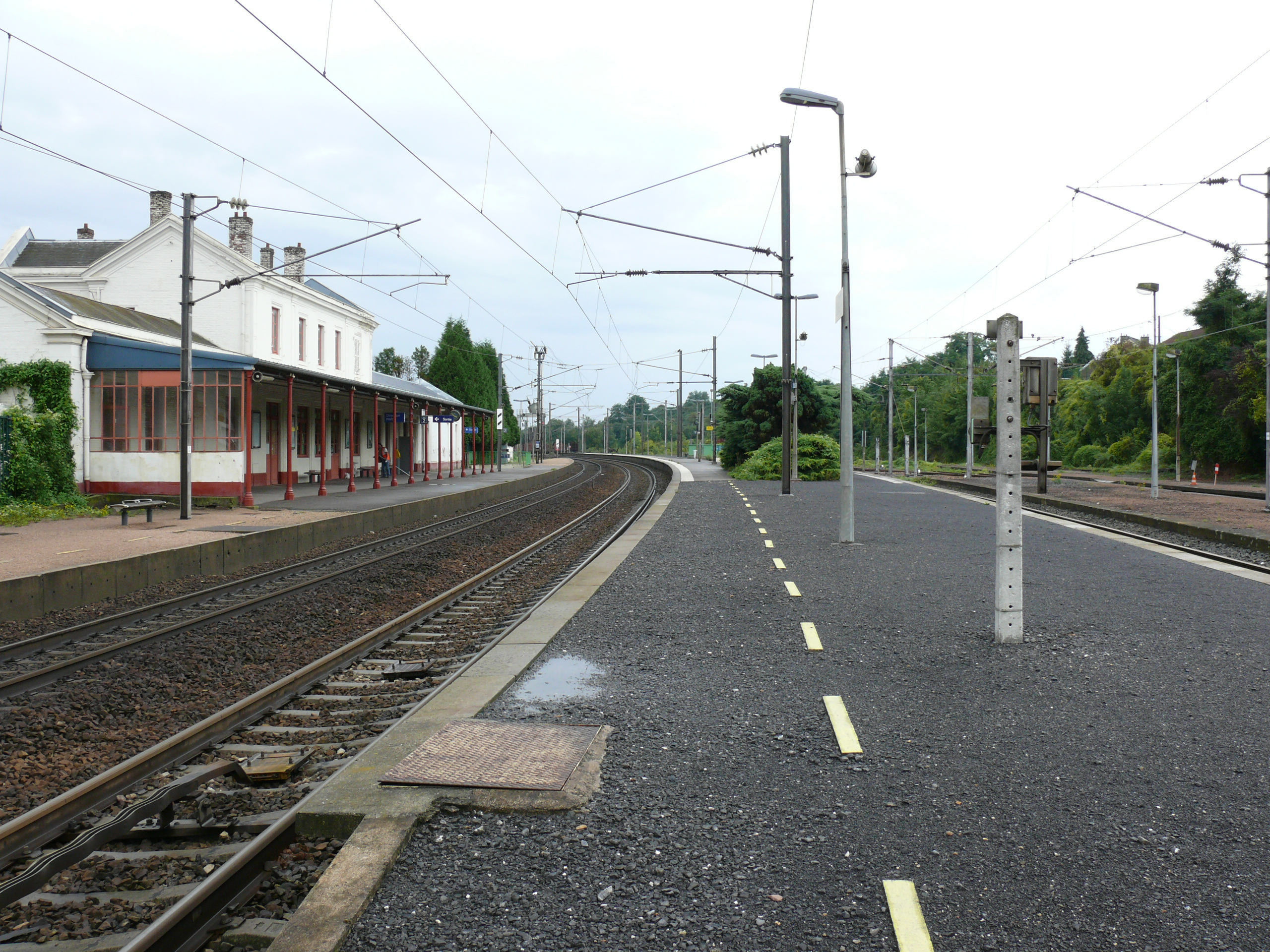 Quais de la Gare de Saint-Just-en-Chaussée (Oise - Picardie - France)